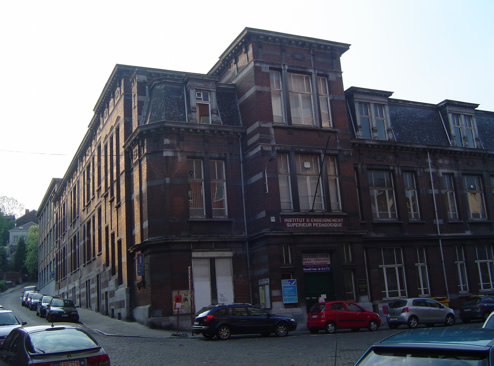 Haute Ecole de la Ville de Liège - Ecole Jonfosse